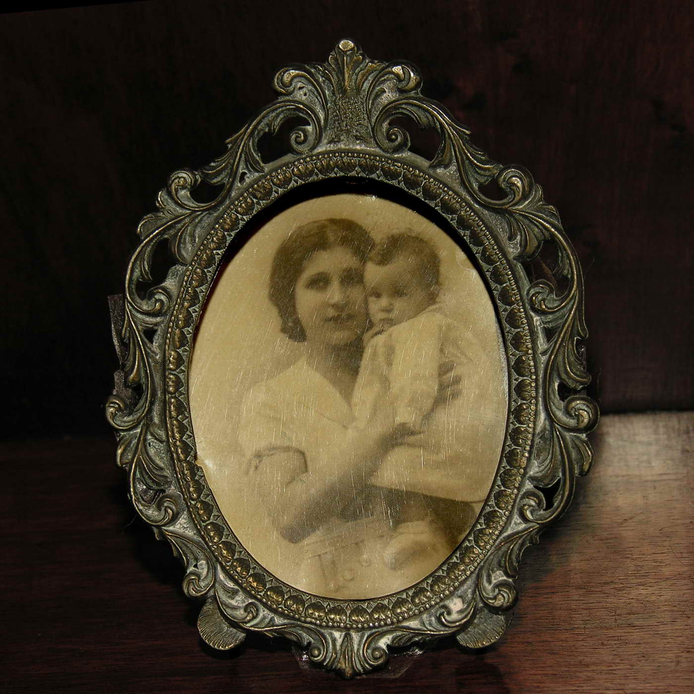 self made.